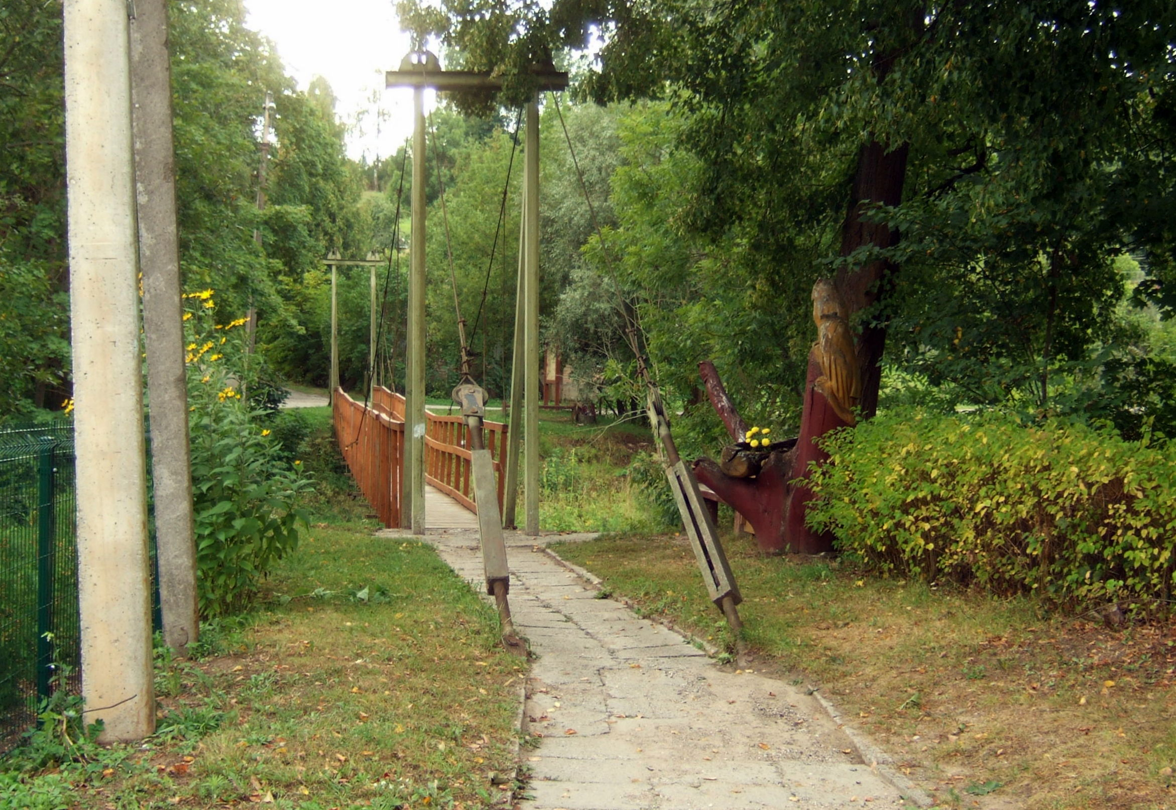 Pakabinamas tiltas per Šventąją Antalieptėje